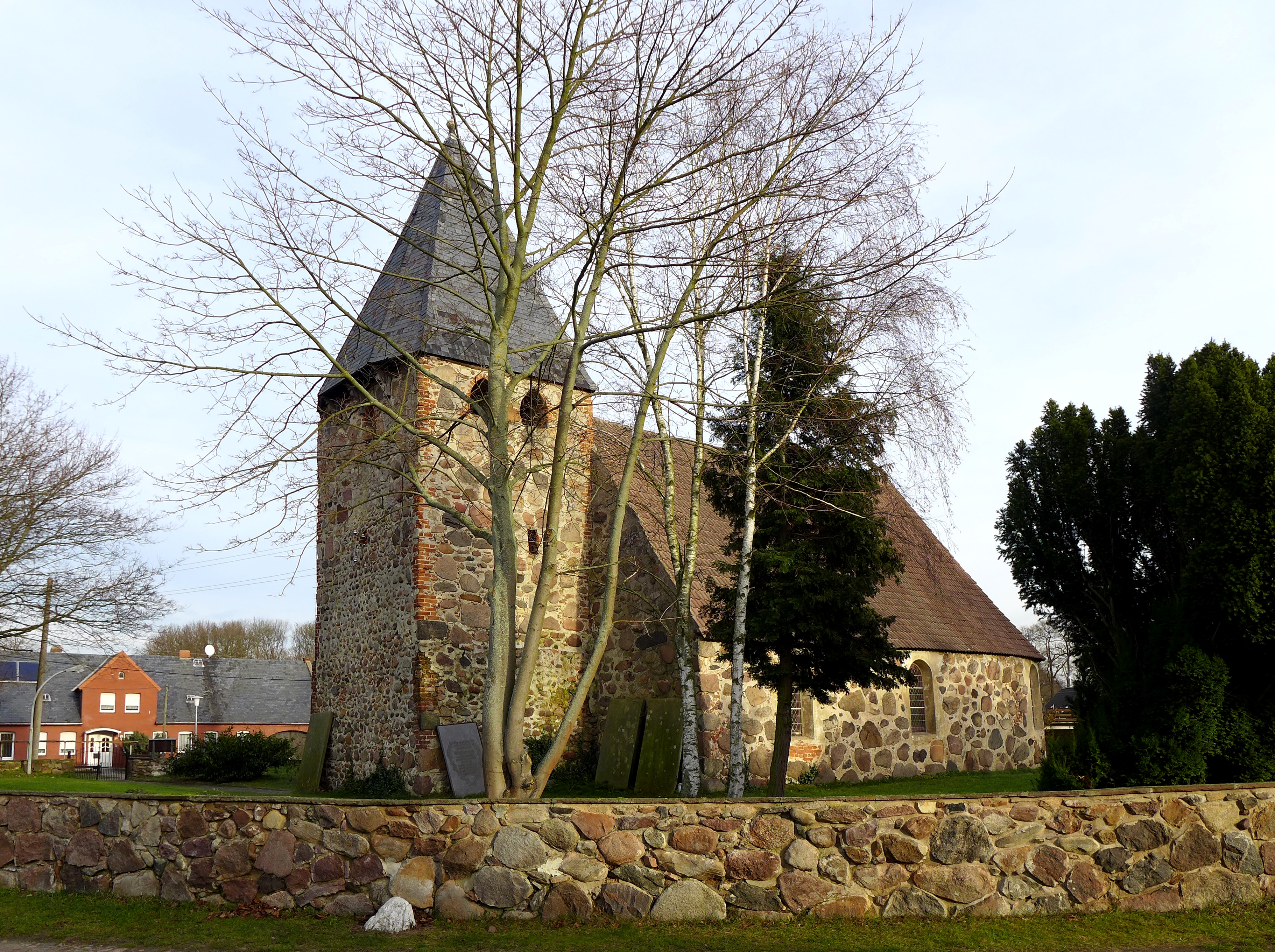 Lokalisierung: Cheine liegt 4km entfernt von Seebenau, beide Orte sind zugehörig der Stadt Salzwedel in Sachsen-Anhalt. Zur Feldsteinkirche Cheine: Ursprung im 13. Jahrhundert, derzeitige Formgebung im Jahre 1744. Die Kirche ist offensichtlich namenlos, sie wird in der Öffentlichkeitsarbeit der Stadt Salzwedel nicht erwähnt. In der Kirche finden noch Gottesdienste statt.